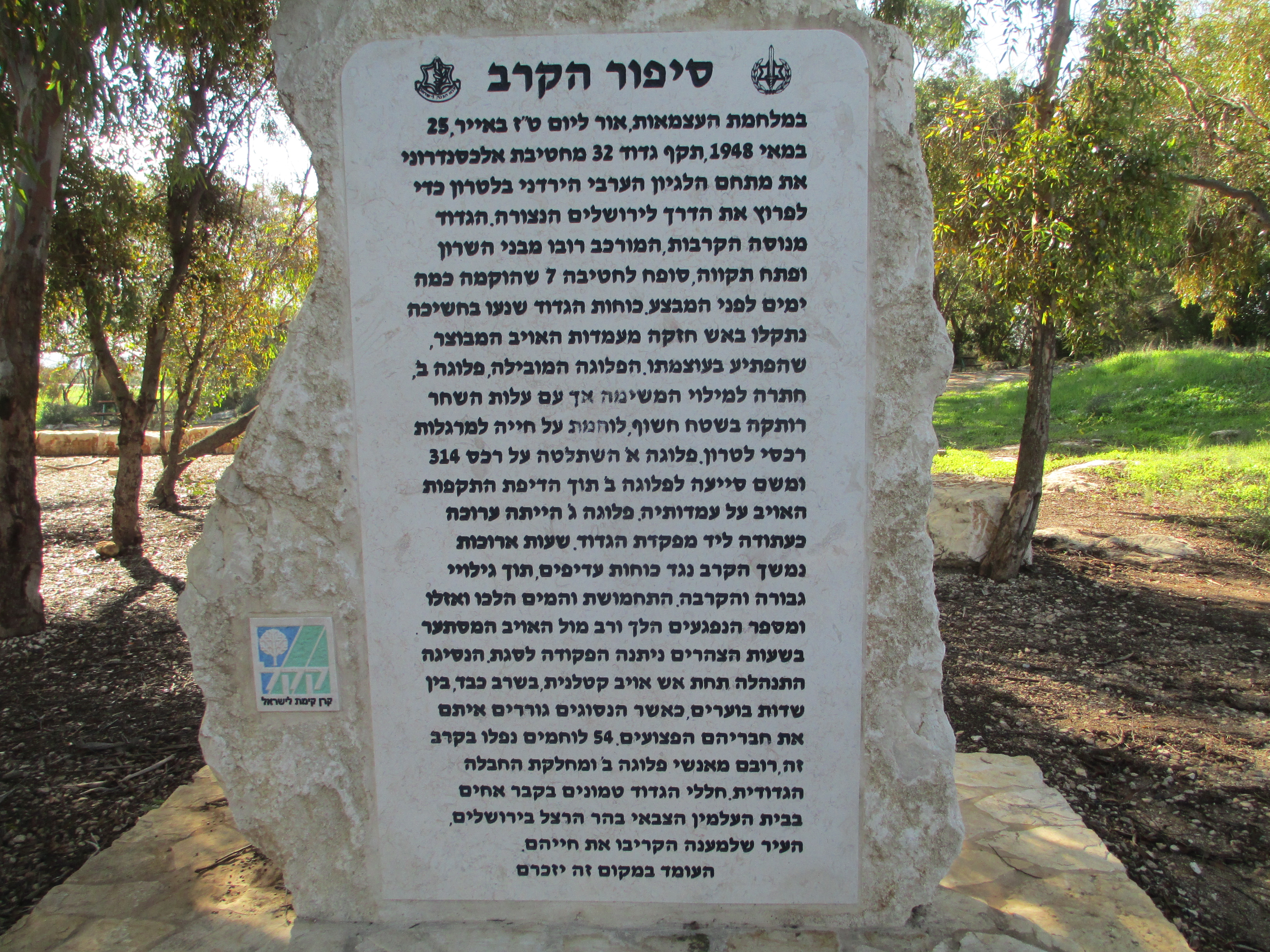 אנדרטת גדוד 32 של אלכסנדרוני ליד לטרון